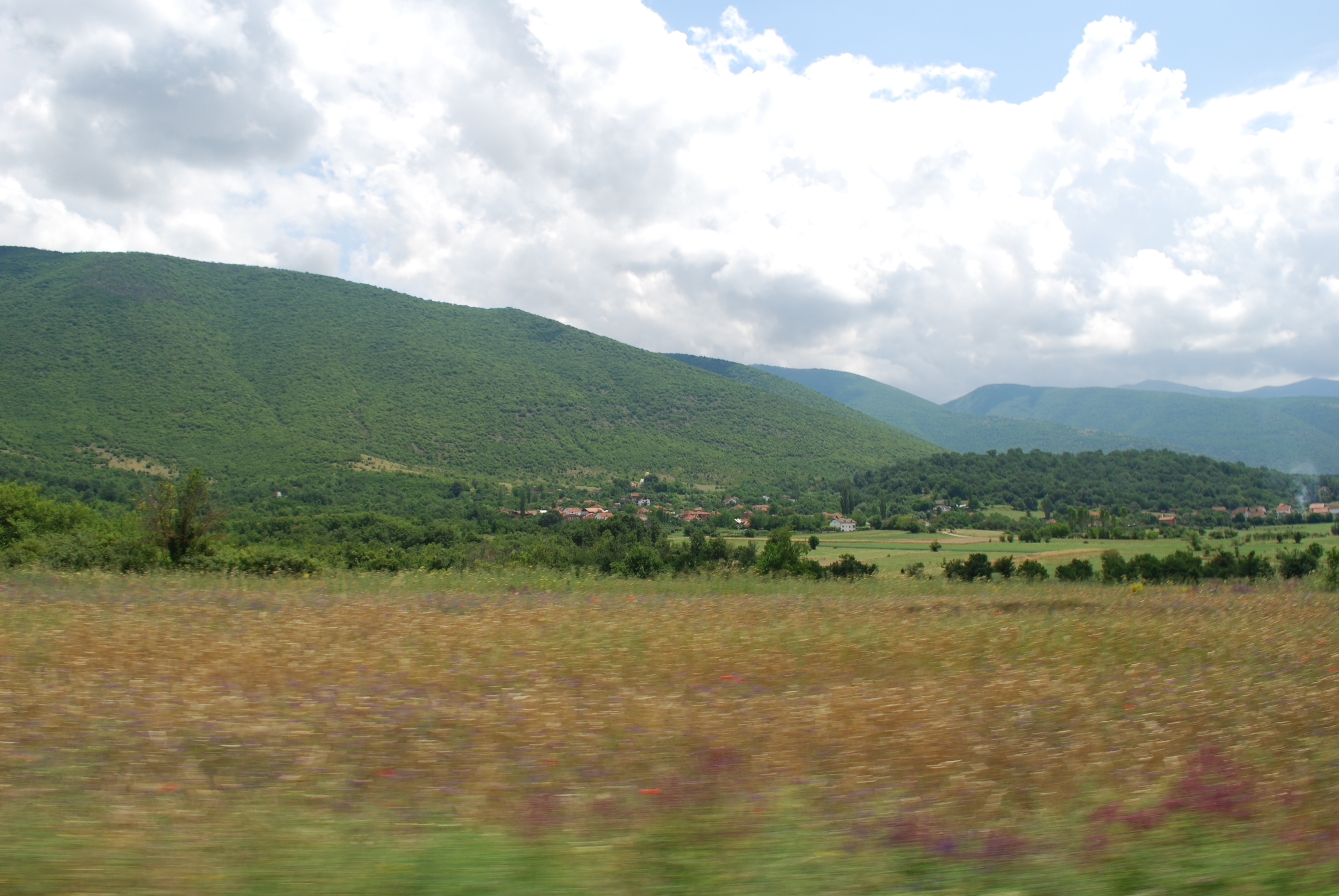 Поглед на тетовска Волковија и Сува Гора